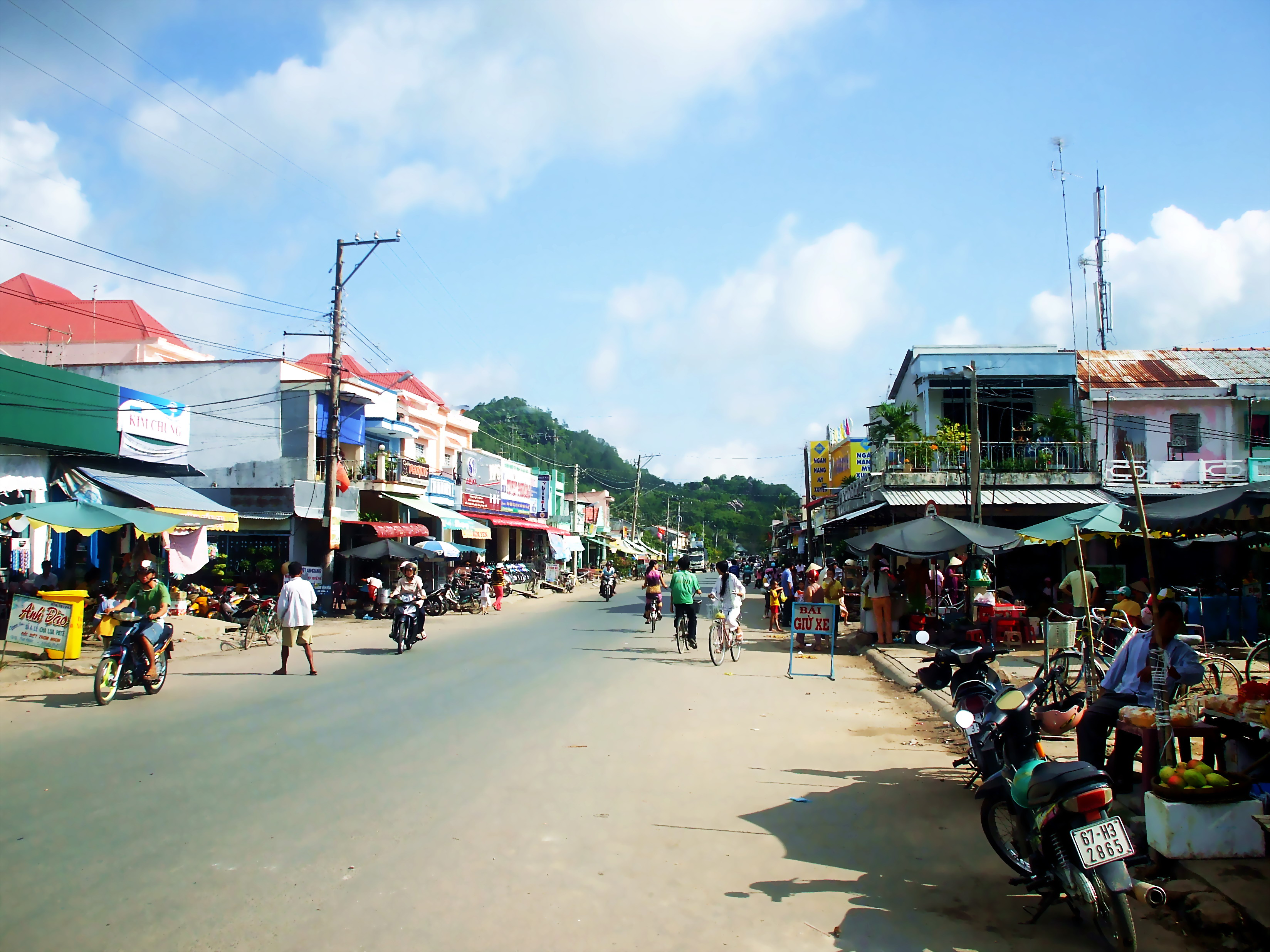 Đường phố chính đi qua chợ thị trấn Ba Chúc, huyện Tri Tôn, tỉnh An Giang, Việt Nam